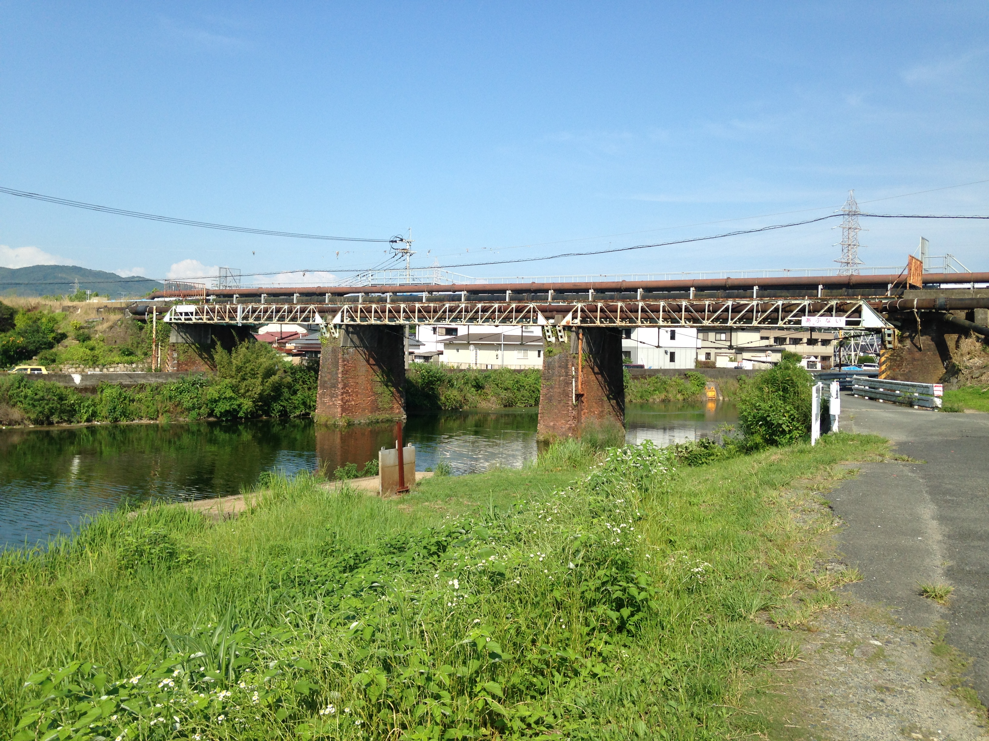 西側より望む三池鉄道三池本線諏訪川橋梁